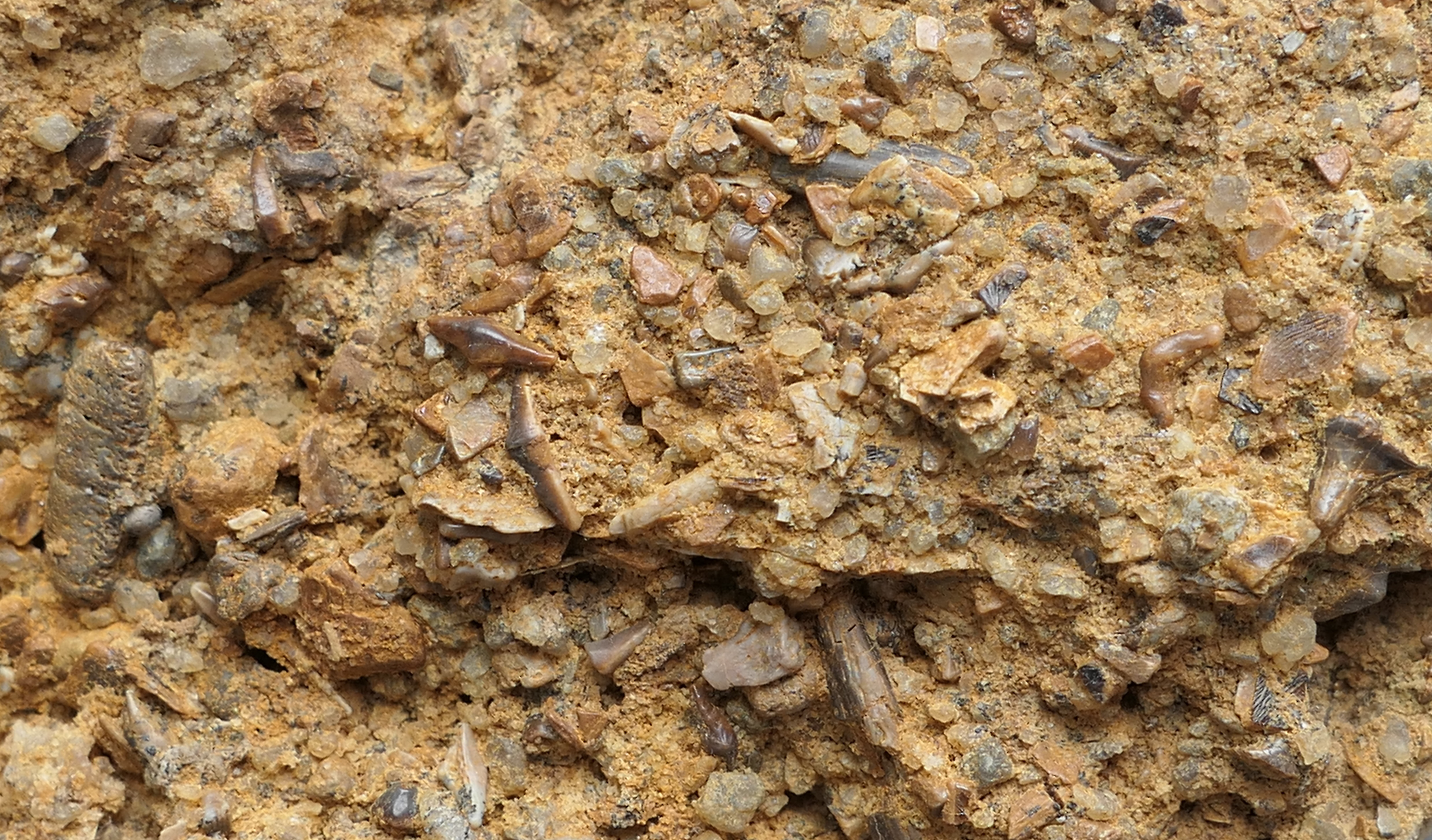 Rhätoliassisches Bonebed aus dem Steinbruch Hägnach (Fa. Nagel) bei Tübingen. Bildbreite: 5,5 cm